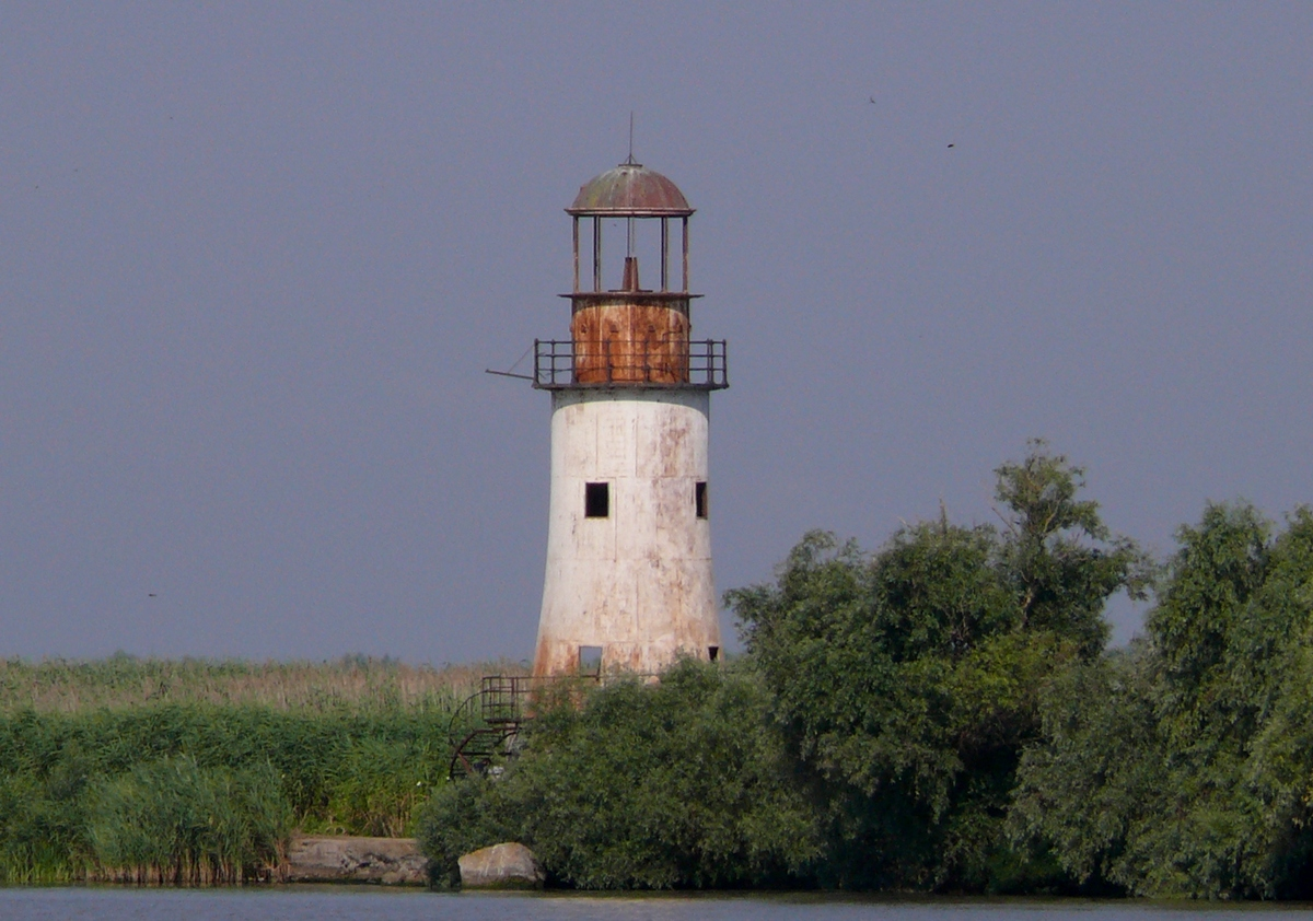 Farul Vechi